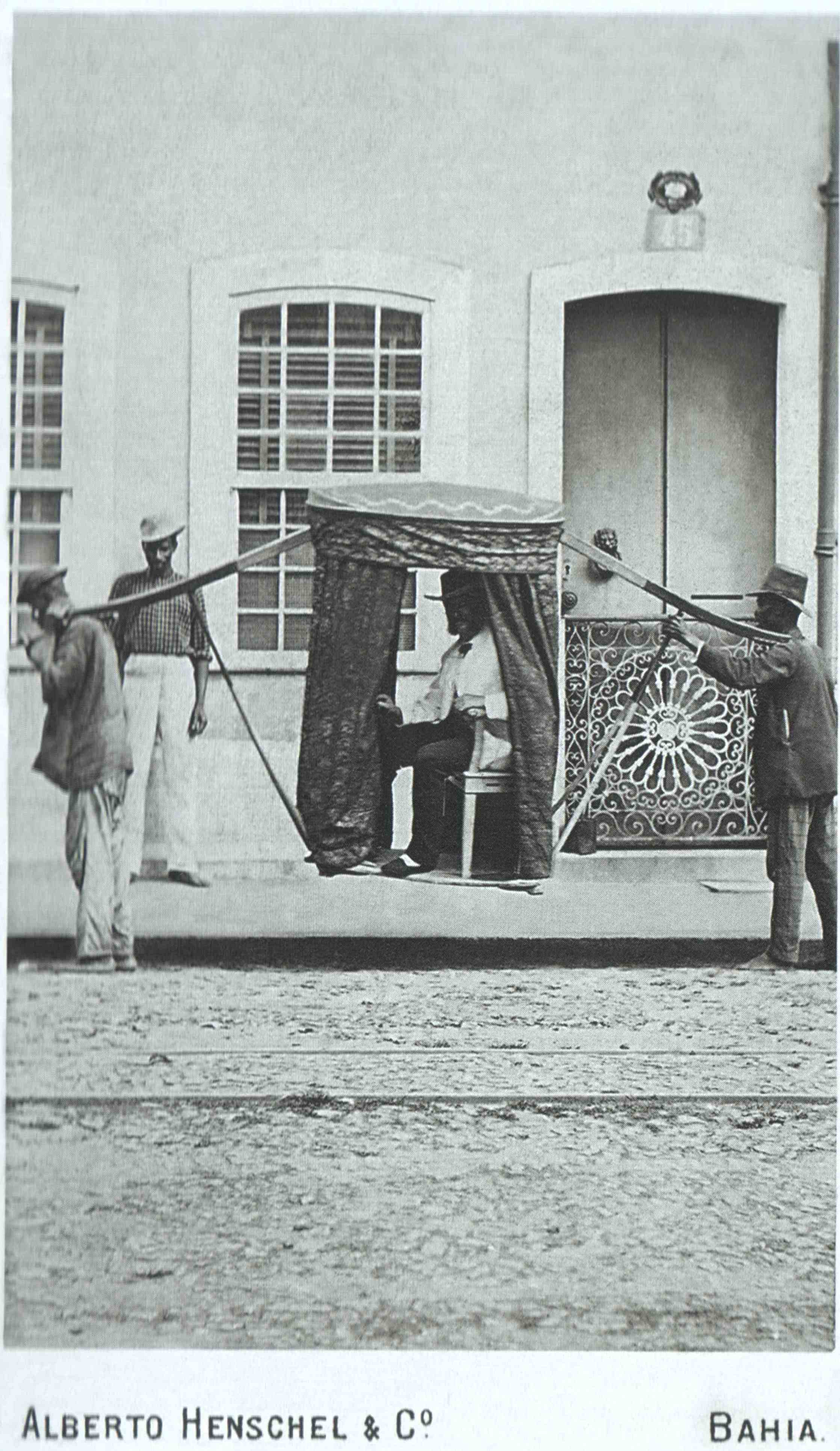 Escravos transportando um homem numa liteira, Bahia.